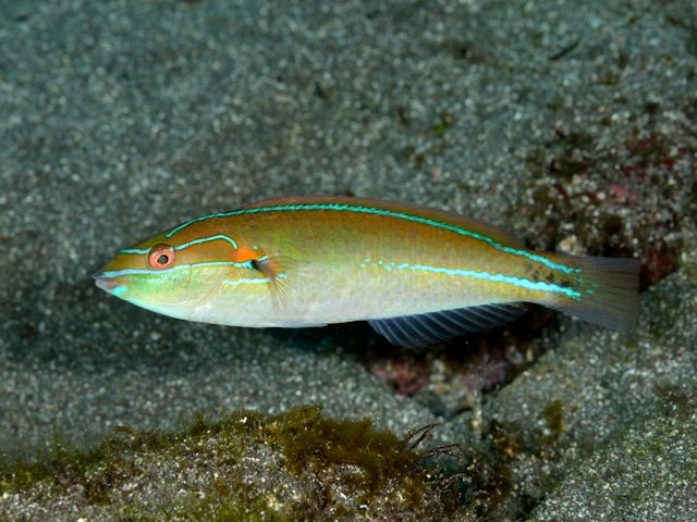 カミナリベラ Stethojulis interrupta terina